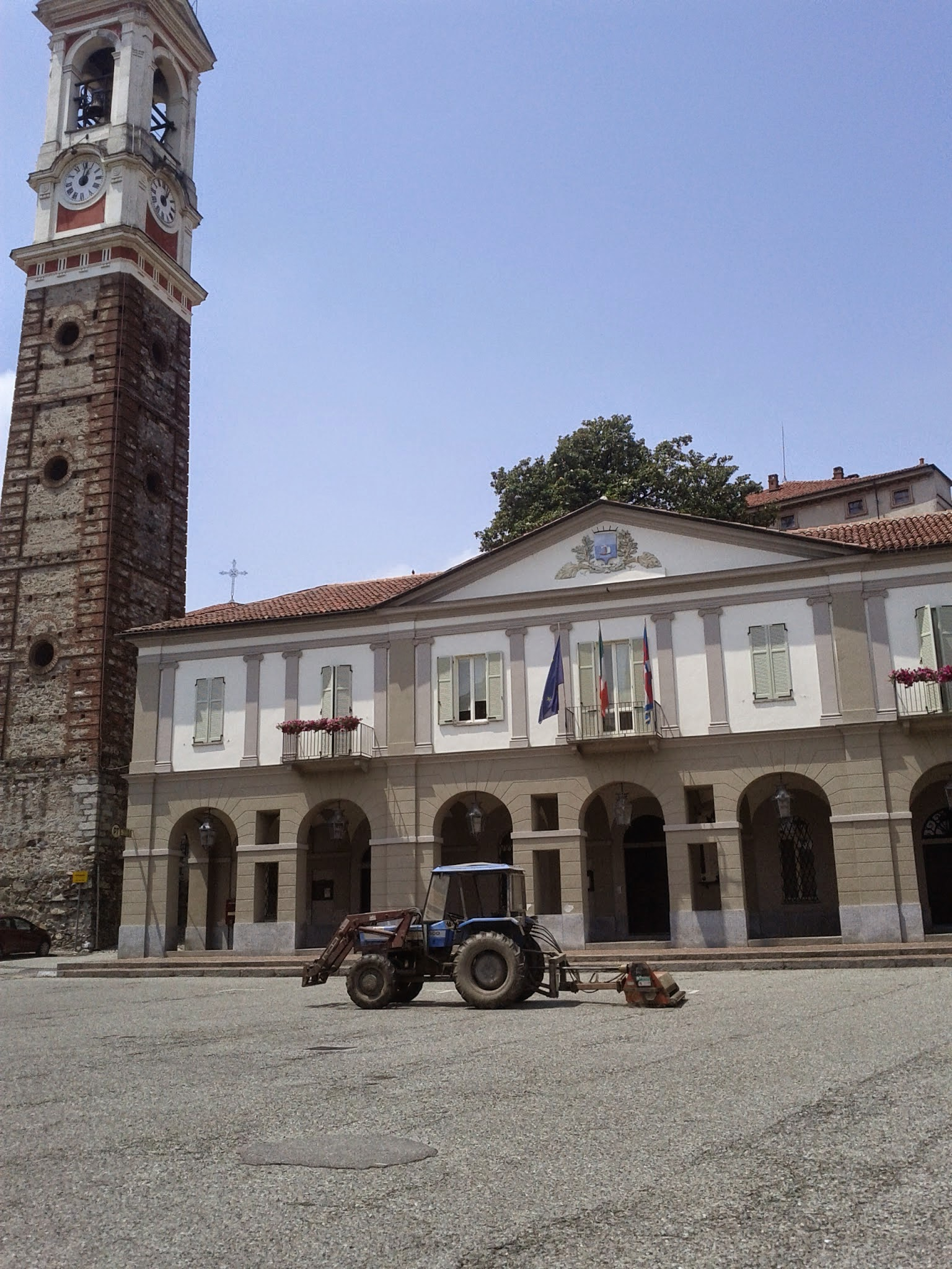 Azeglio